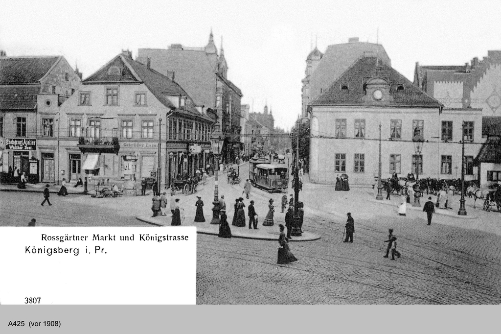 Königsberg